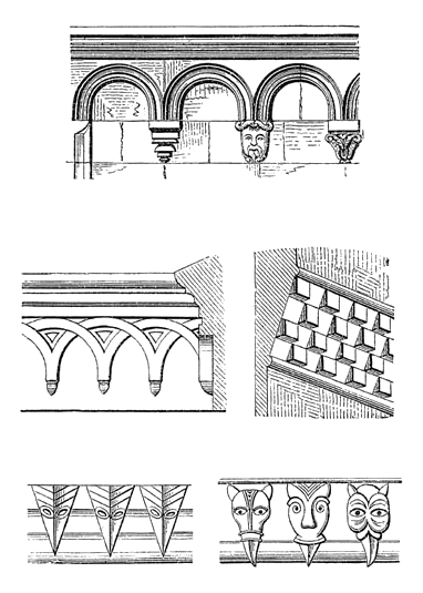 [oben] Rundbogenfries. [Mitte links] Kreuzungsbogenfries (romanisch). [Mitte rechts] Schachbrettfries. [unten] Schnabelkopffries (anglo-normännisch).